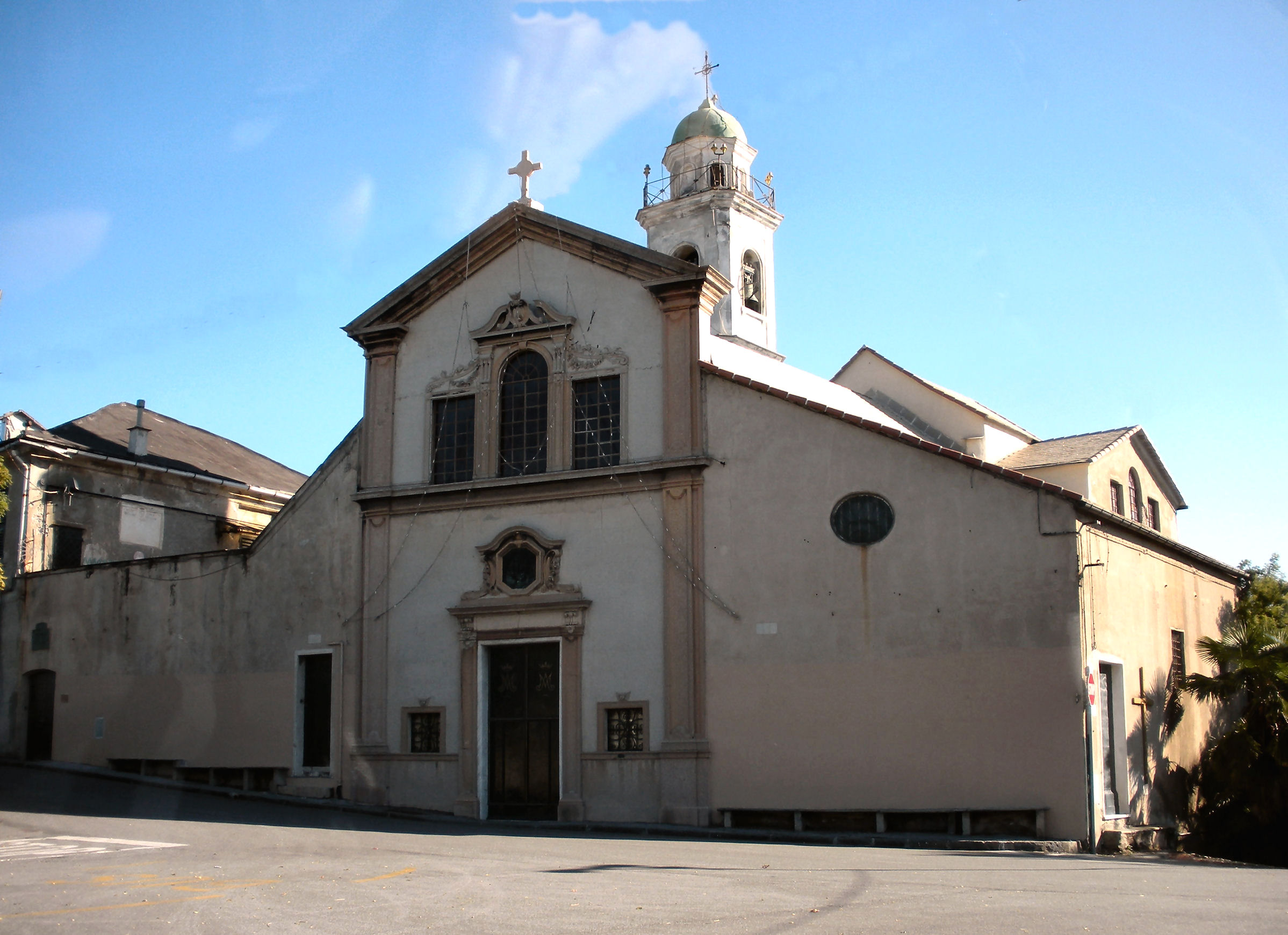 Sampierdarena, loc. Belvedere, comune di Genova: la chiesa della Natività di Maria Santissima detta anche Santuario di Nostra Signora di Belvedere.